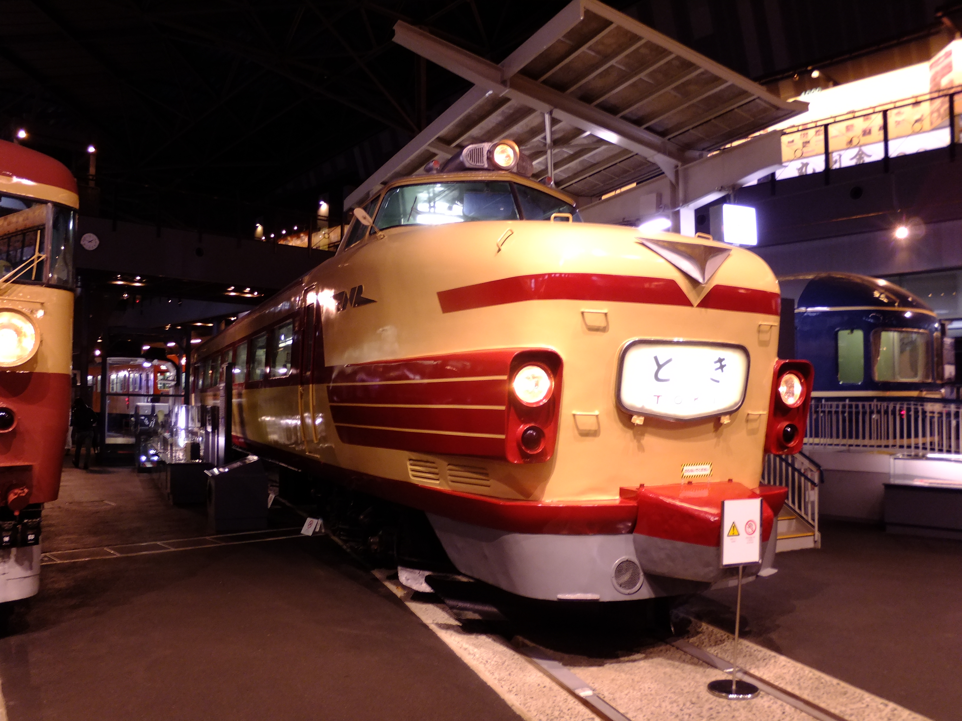 国鉄181系電車クハ181-45。もと161系から181系に編入されたグループ。ヘッドマークの『とき』の下に漢字で「朱鷺」と記されているのが特徴的